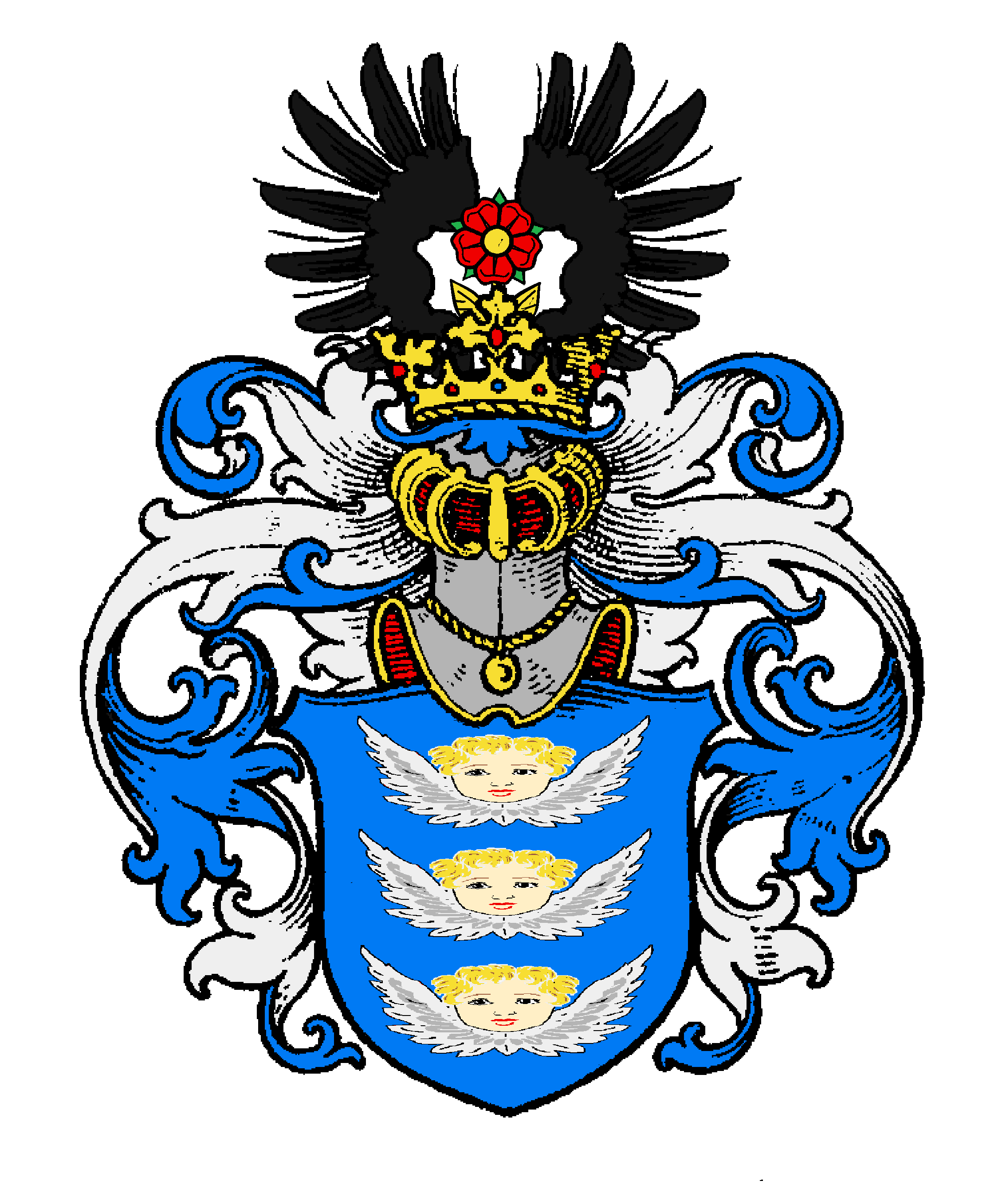 Wappen der Engelbrecht, einer ursprünglich pommerschen Familie. Das u.a. 1744 mit diesem Wappen (mit Vorbildern in Greifswald bzw. Stralsund) HRR-nobilitierte Geschlecht der Engelbrechten konnte sich späterhin u.a. auch nach Preußen und Bayern ausbreiten und gelangte zu einigem Ansehen. Zweige der Familie bestehen bis heute fort.